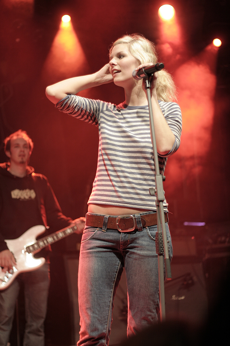 Eva Briegel